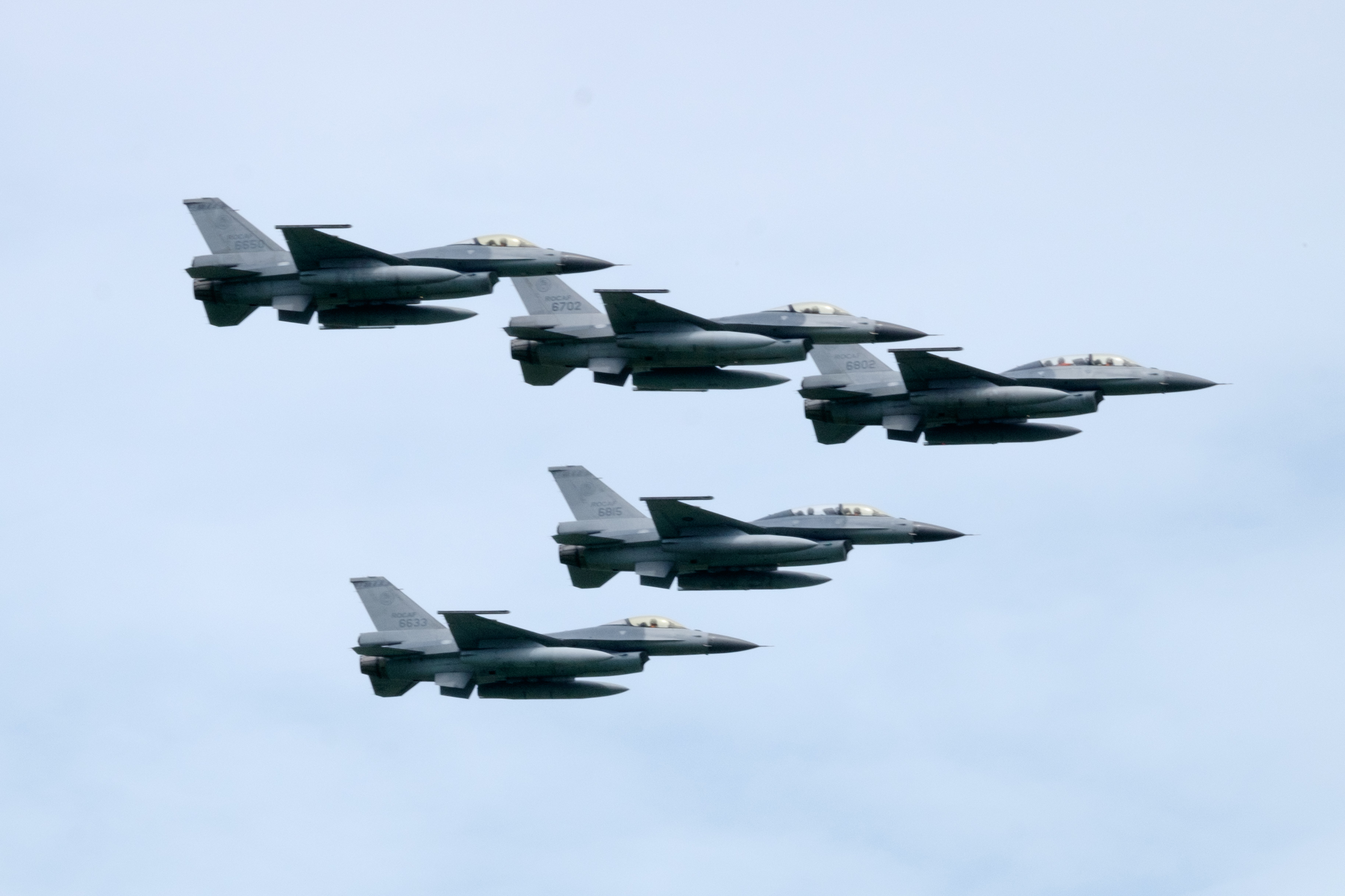 2016空軍花蓮基地營區開放活動上午，401聯隊三波五機F-16編隊飛行衝場通過花蓮基地上空的第一波。